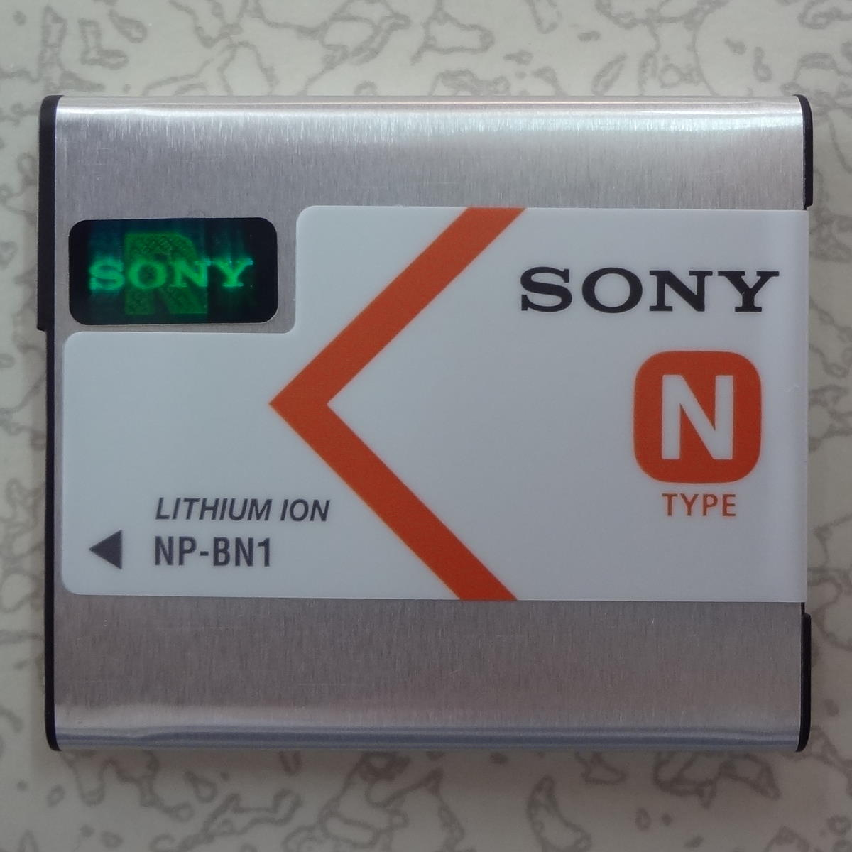 2013年10月3日製造的Sony數位相機專用電池NP-BN1正面。